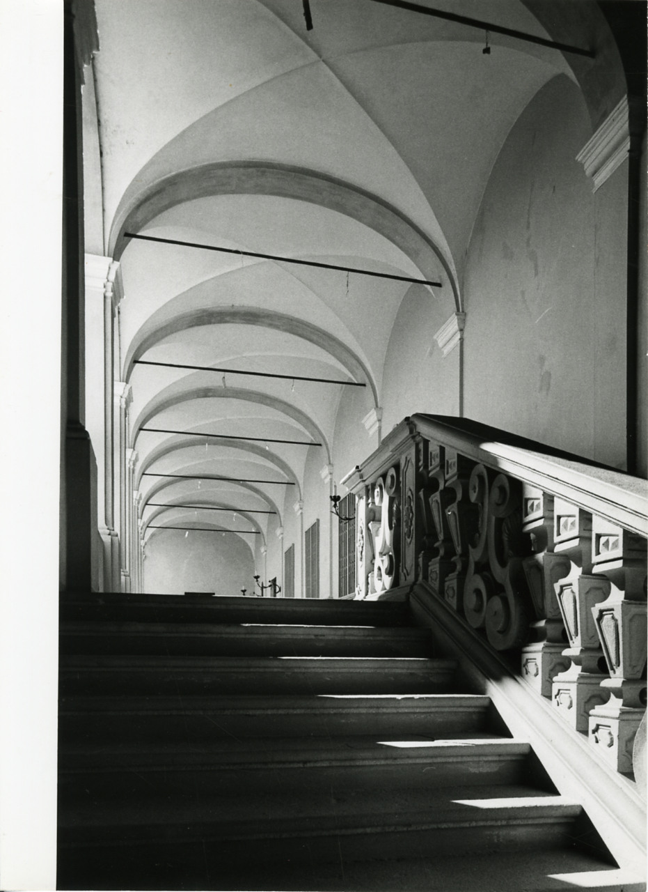 Servizio fotografico : Gossolengo, 1981 / Paolo Monti. - Stampe: 2 : Positivo b/n, gelatina bromuro d'argento/ carta, 24x30. - ((Al verso delle stampe manoscritti i numeri dei negativi corrispondenti: 92/3, 92/17, 92/19. Sul coperchio della scatola, manoscritto a pennarello: "Città Storiche/ Piacenza". - Occasione: Documentazione di antiche ville nel territorio (secondo accordi con il Signor Tirotti). - Fonte: Fattura di Paolo Monti: IV. Commesse/ Fattura n. 44/ Riprese fotografiche antiche ville nel territorio di Piacenza (1981/12/30), presso Archivio Paolo Monti. N. 140 riprese stampate in formato 24x30